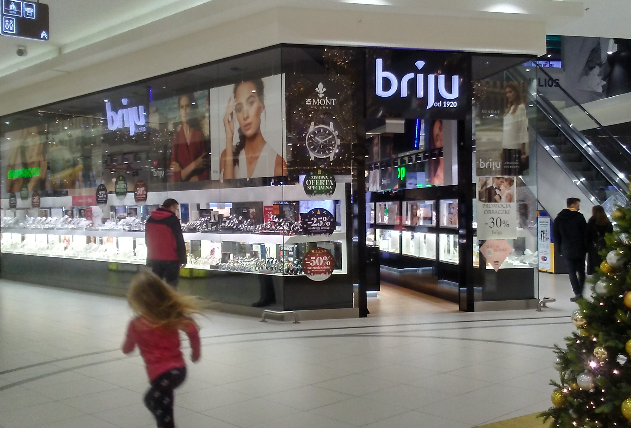 Tomaszów Mazowiecki w województwie łódzkim, PL,EU. Salon polskiej firmy jubilerskiej istniejącej od 1920 roku – Briju, CC0